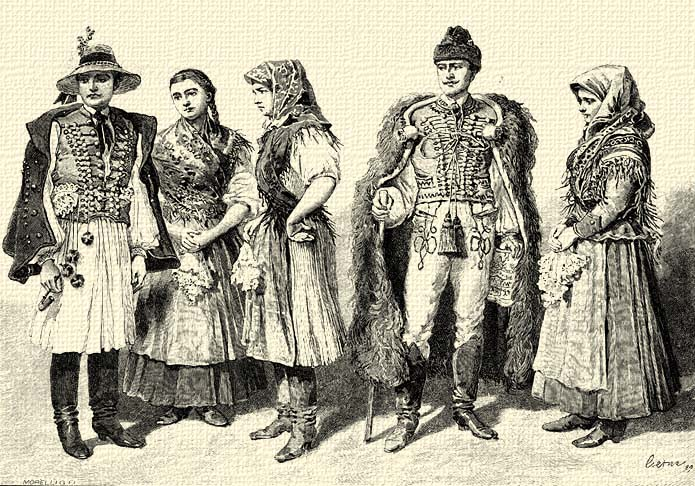 Deésházi népviselet. A m. kir. államnyomda által az Osztrák-Magyar Monarchia irásban és képben czímű műből kizárólag e monographia számára átadott klisé.